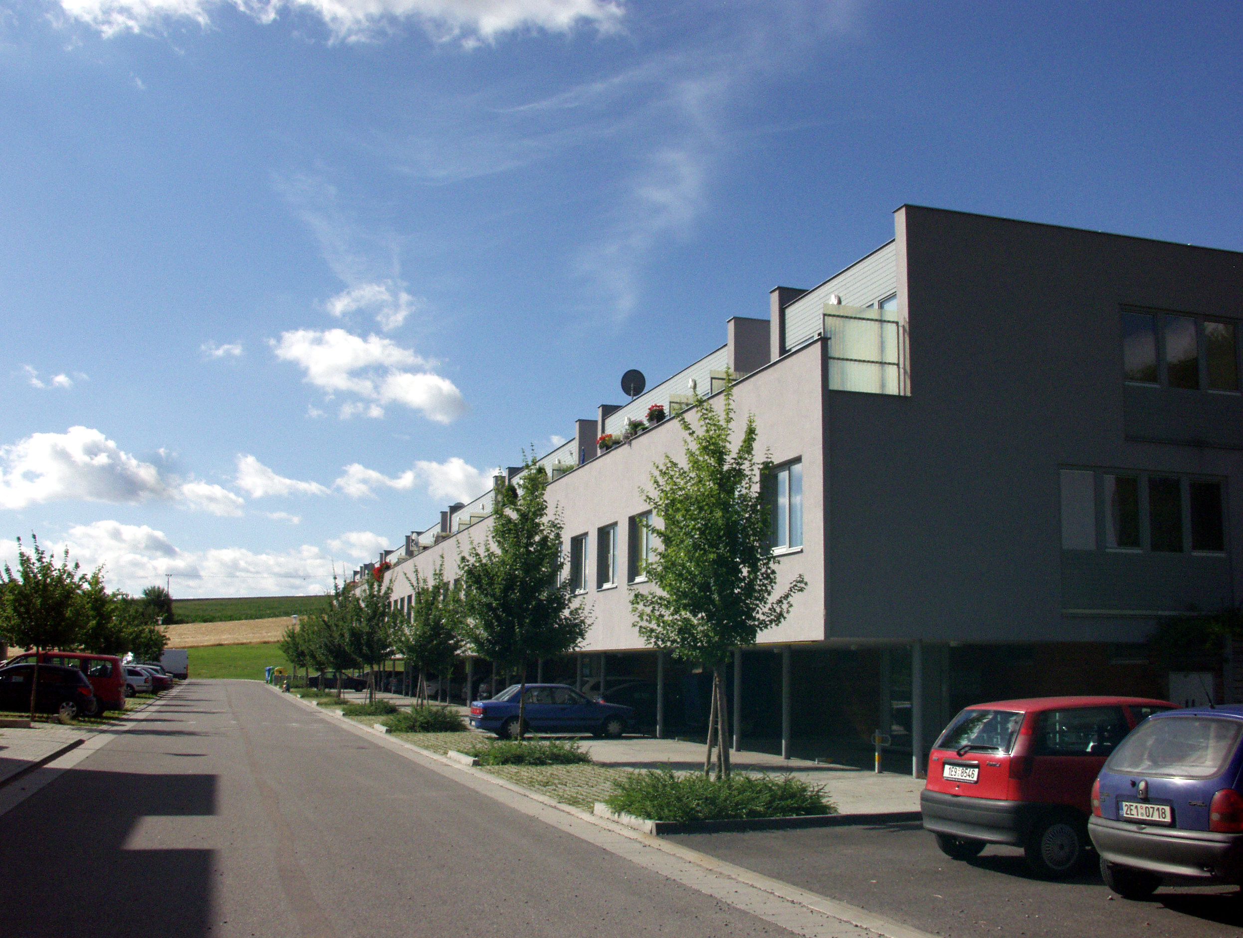 Litomyšl, Blok obytných domů C10-C14 (autor: Josef Pleskot, AP Ateliér)